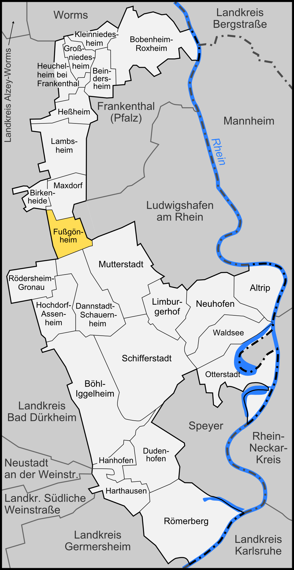 Karte der Gemeinde Fußgönheim im Rhein-Pfalz-Kreis